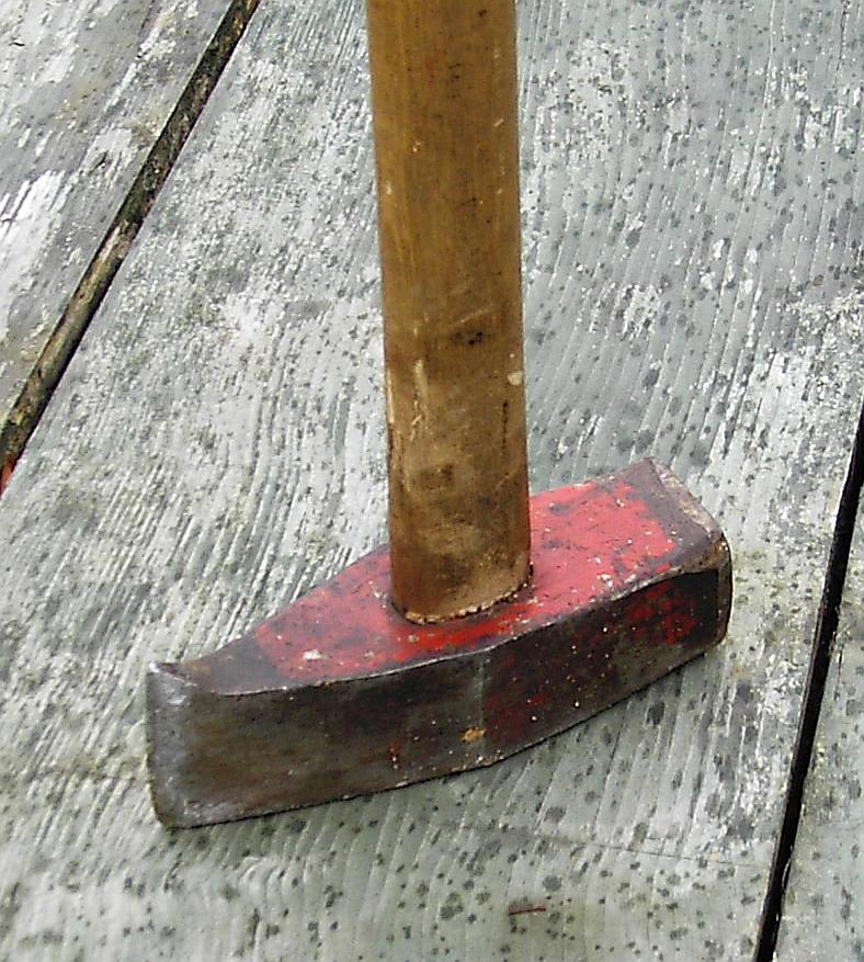 Schwere Axt, Spaltaxt